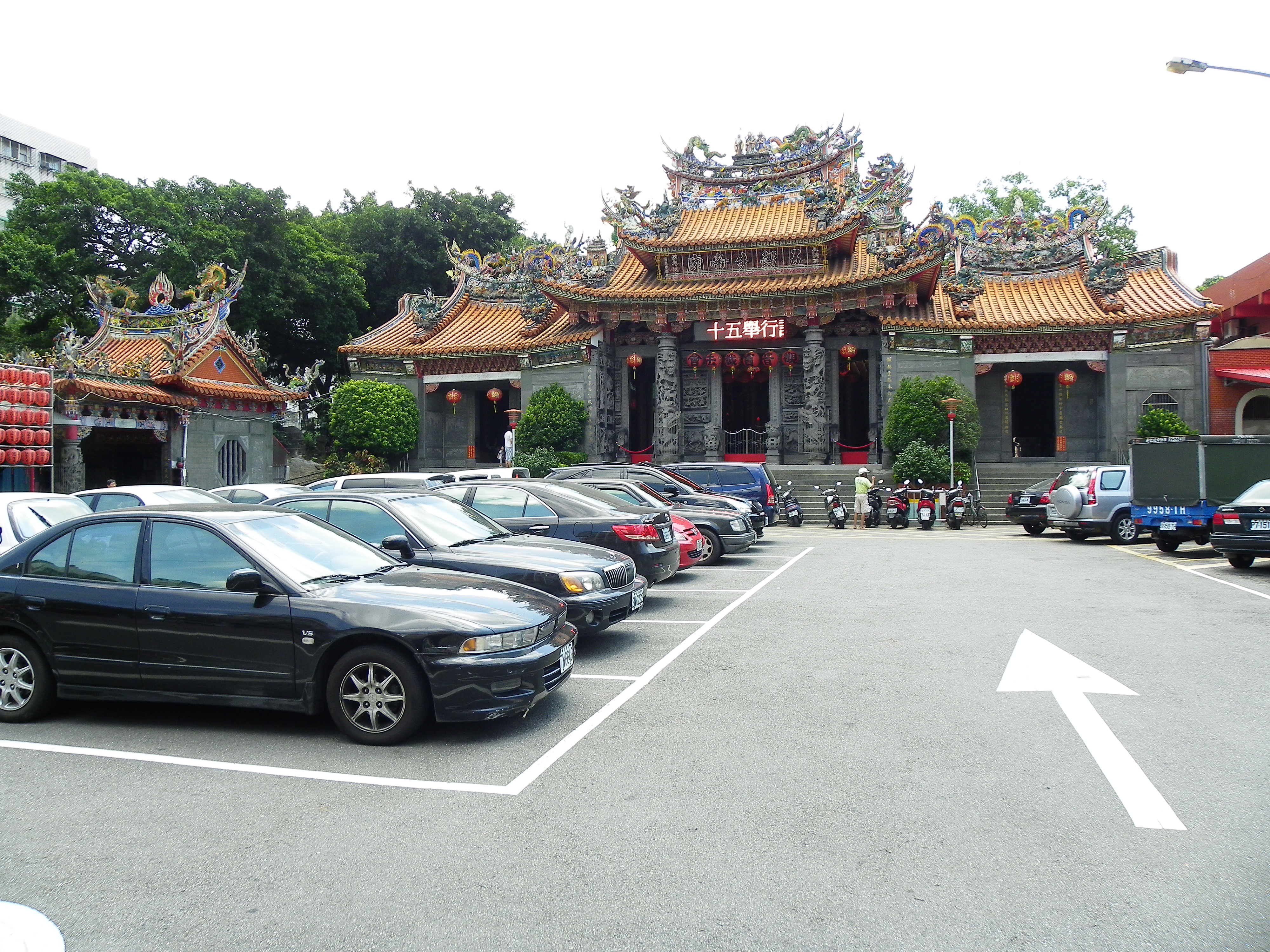 臺北縣土城市五穀先帝廟前。